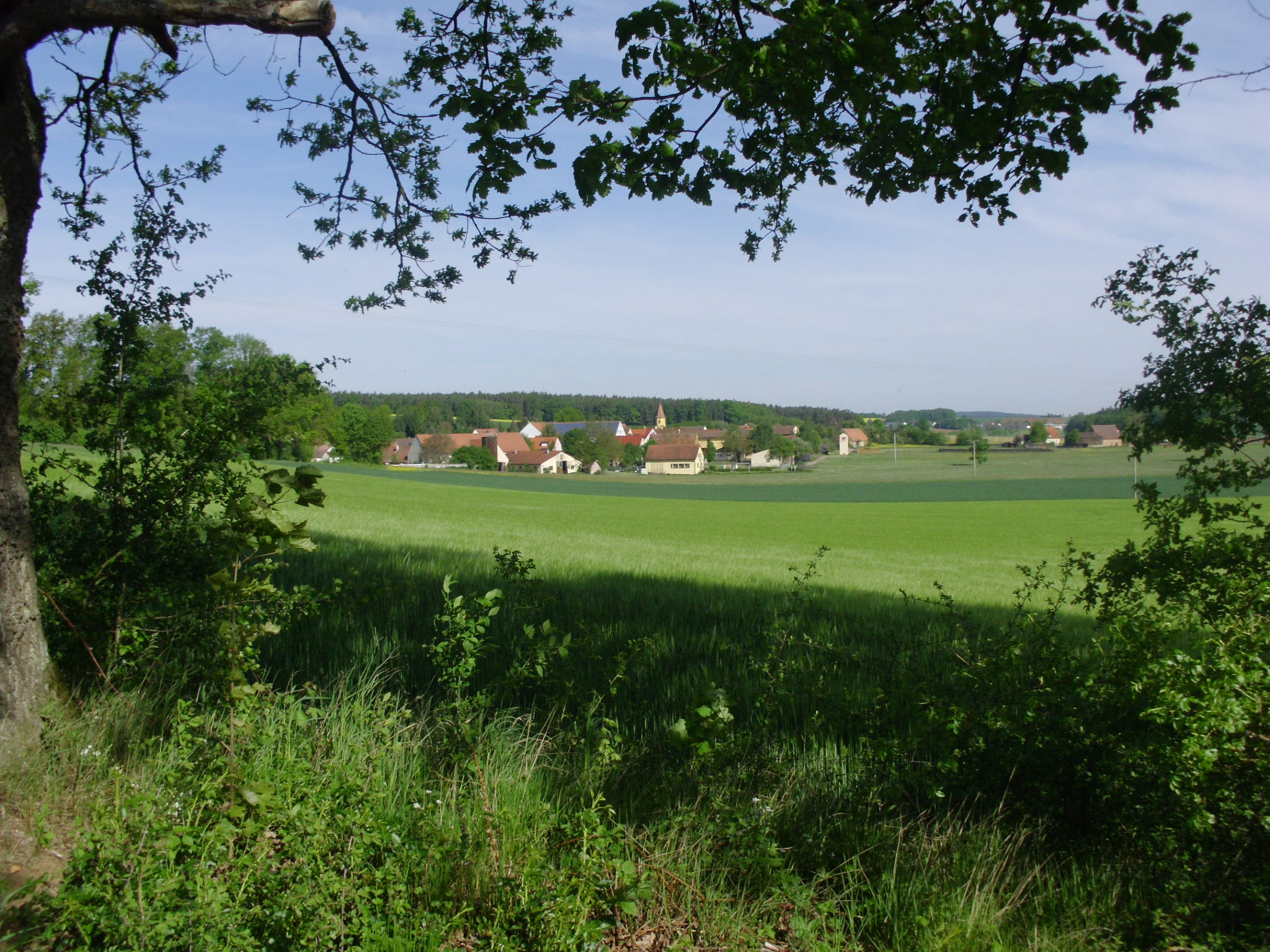 Nordstetten, Ortsteil von Gunzenhausen im mittelfränkischen Landkreis Weißenburg-Gunzenhausen